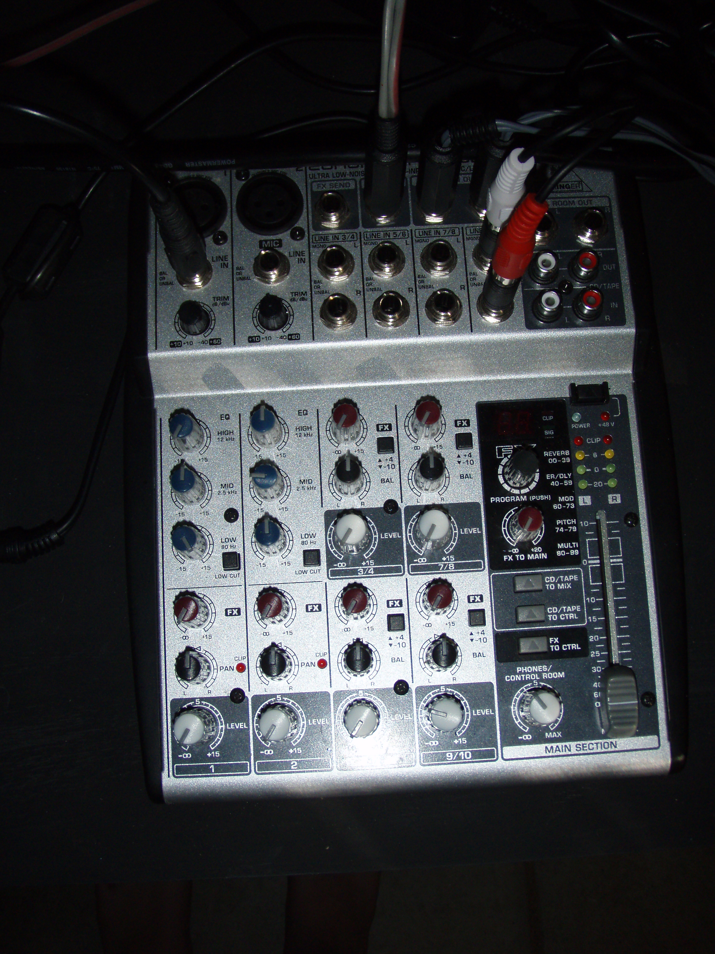 A Behringer EuroRack UB1002FX